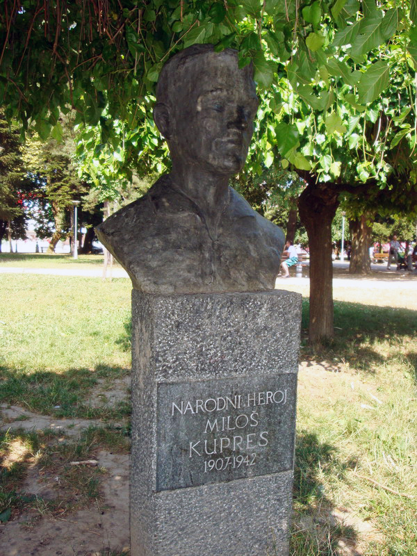 Милош_Купрес